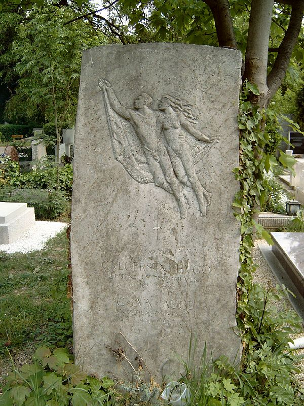 Gregersen Hugó (Bp., 1889. júl. 16. – Bp., 1975. nov. ? ) építész, festőművész és Lux Alice G. (Bustyaháza, 1906. október 23. - Budapest, 1988. augusztus 21.) szobrász sírja Budapesten. Farkasréti temető: 35-5-73 [szobrász: Lux Alice].